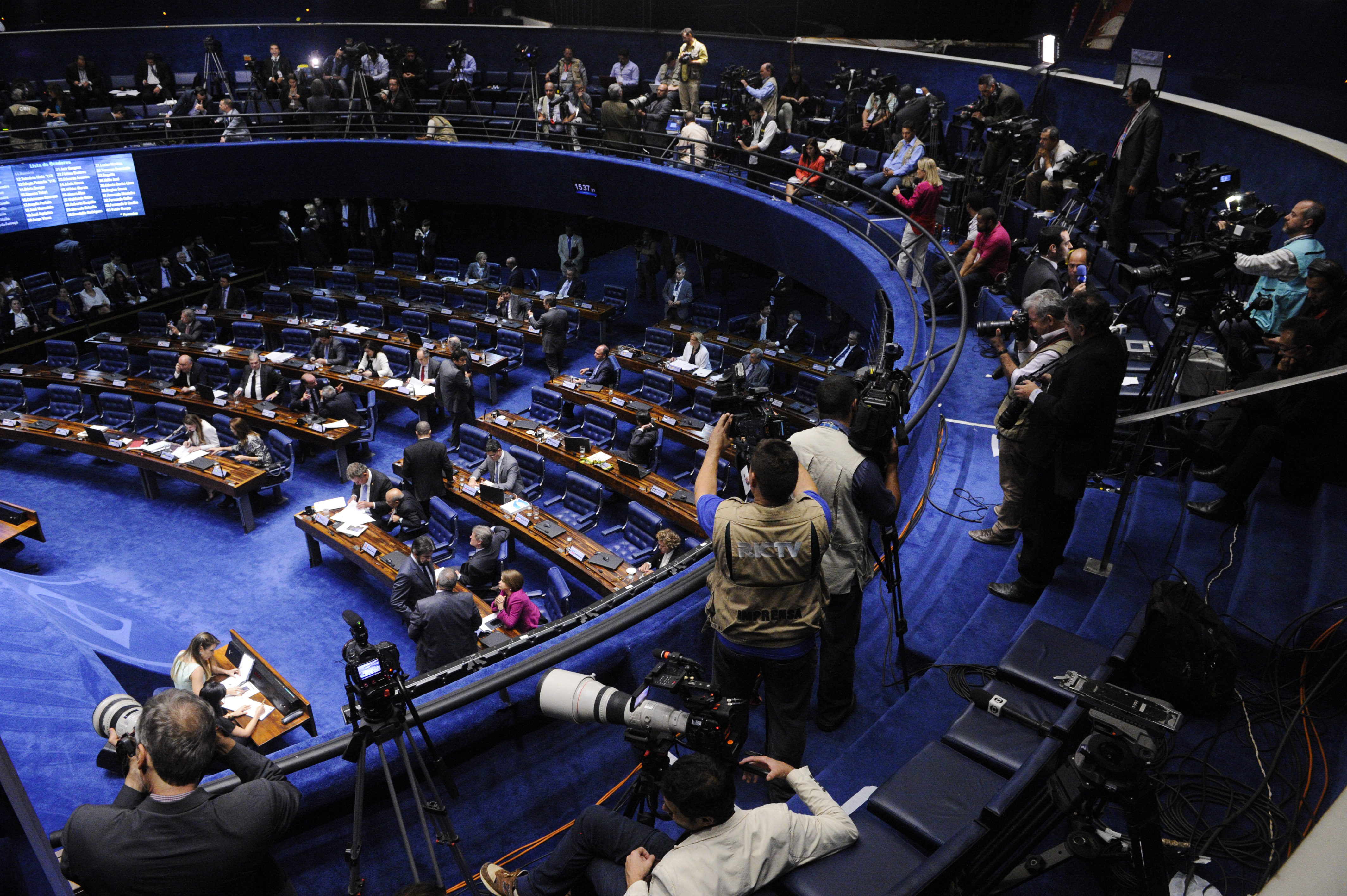 Plenário do Senado durante sessão deliberativa extraordinária que decidirá pela aprovação ou rejeição do relatório favorável à admissibilidade do processo de impeachment da presidente Dilma Rousseff. Foto:Pedro França/Agência Senado